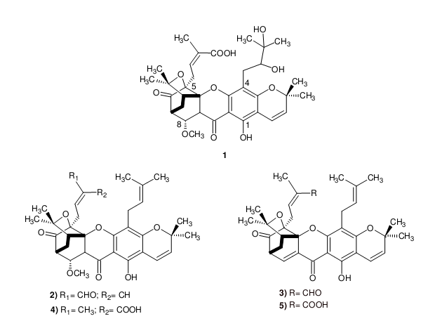 molec